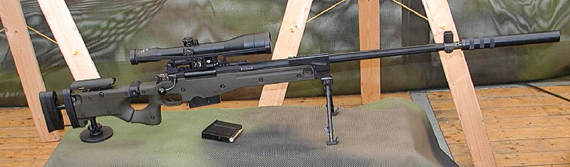 G22-Scharfschützen-Gewehr der Bundeswehr